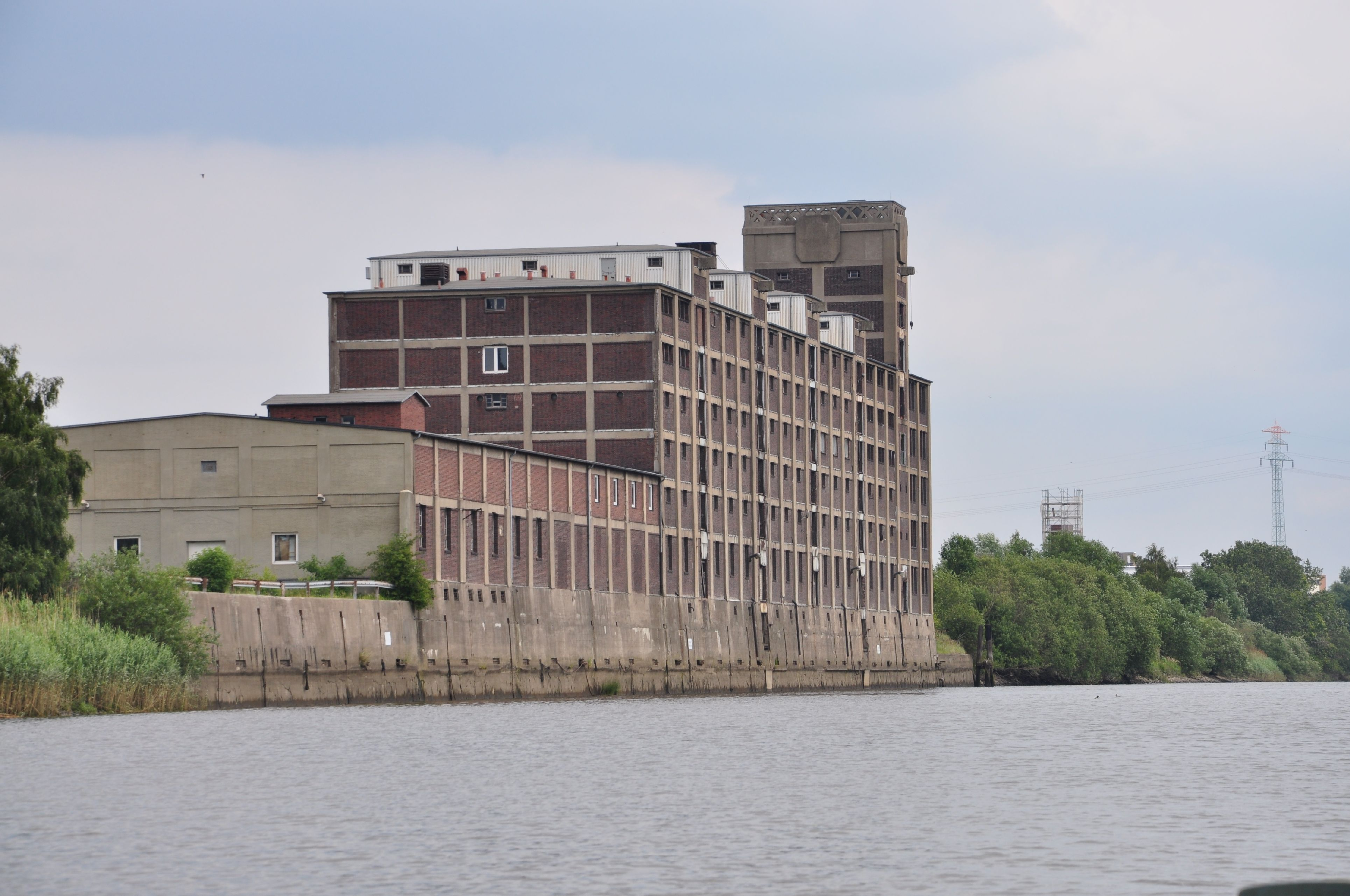 Veddel, Hamburg, Germany: ehemaliges Zentrallager der Großeinkaufsgesellschaft Deutscher Konsumvereine (GEG), trotz Denkmalschutz 2014 abgerissen[1]